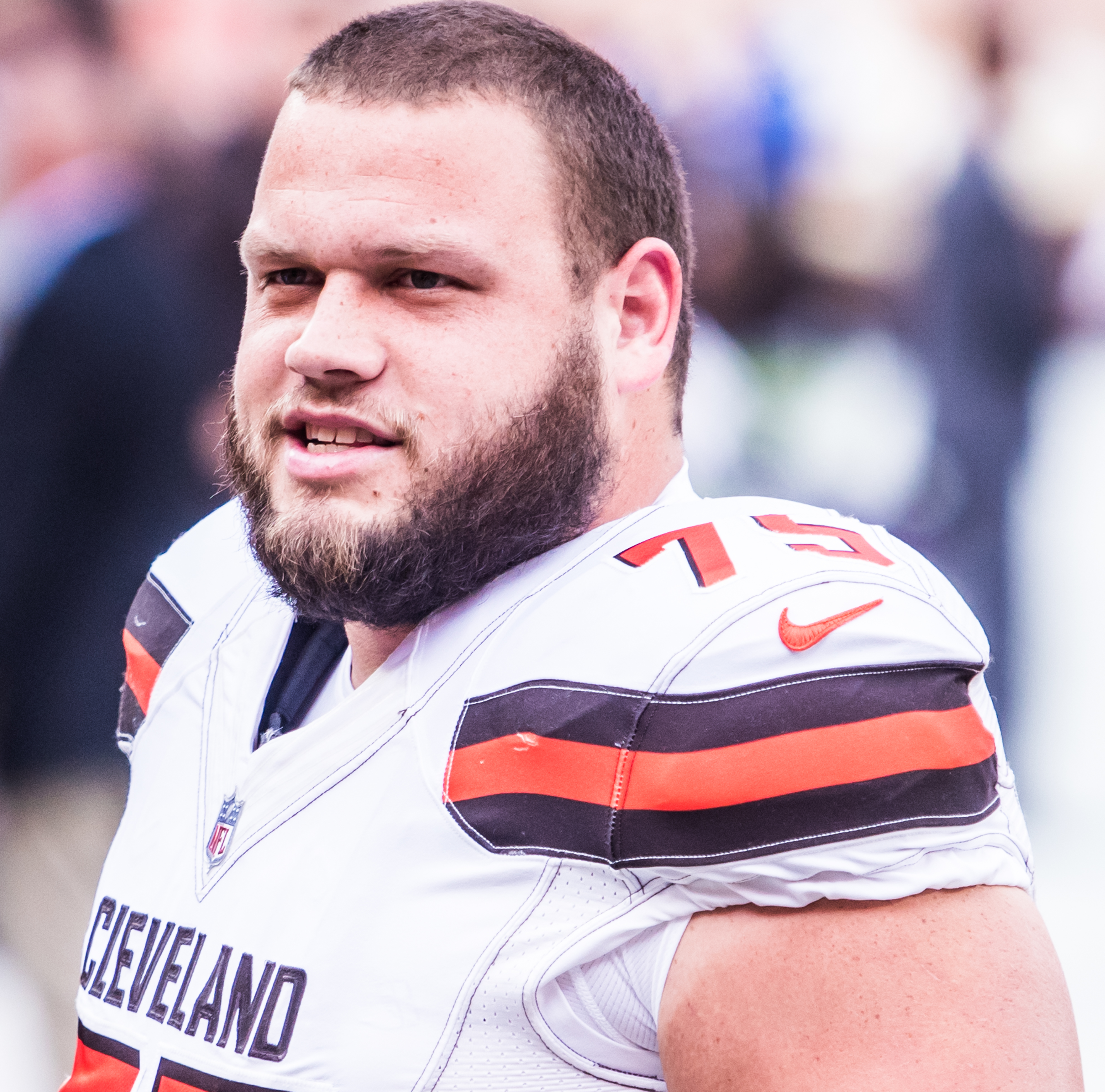 Joel Bitonio